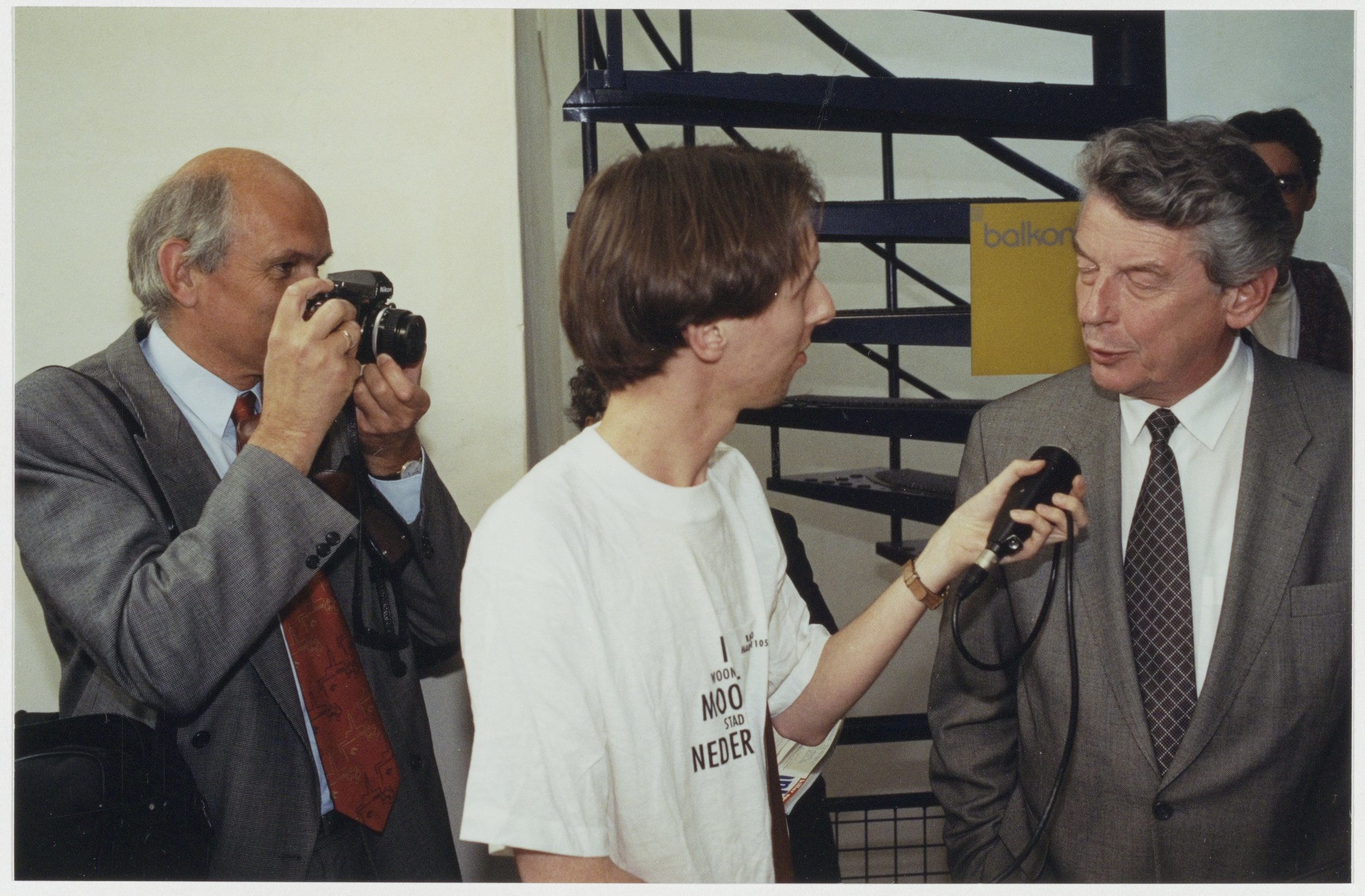 CollectieCollectie Fotoburo de BoerInventarisnummerNL-HlmNHA_54036198NL-HlmNHA_1478_41236kcBeschrijvingBurgemeester Pop fotografeert premier Wim Kok bij de landelijke 1 mei-viering van de PvdA in het concertgebouw.FotonummerNL-HlmNHA_1478_2518DocumenttypeHistorieprenten, tekeningen en foto'sVervaardigerHendriks, Rob (UP De Boer) Soort vervaardigerFotograaf AnnotatiesHD 020595PersonenPop, Jacobus Johannes Hermanus (Jaap) (* 1941)Kok, Wim LandNederland ProvincieNoord-Holland GemeenteHaarlem PlaatsHaarlem StraatLange Begijnestraat Begindatum01-05-1995Einddatum01-05-1995TechniekFoto Trefwoordenbestuur en politiek